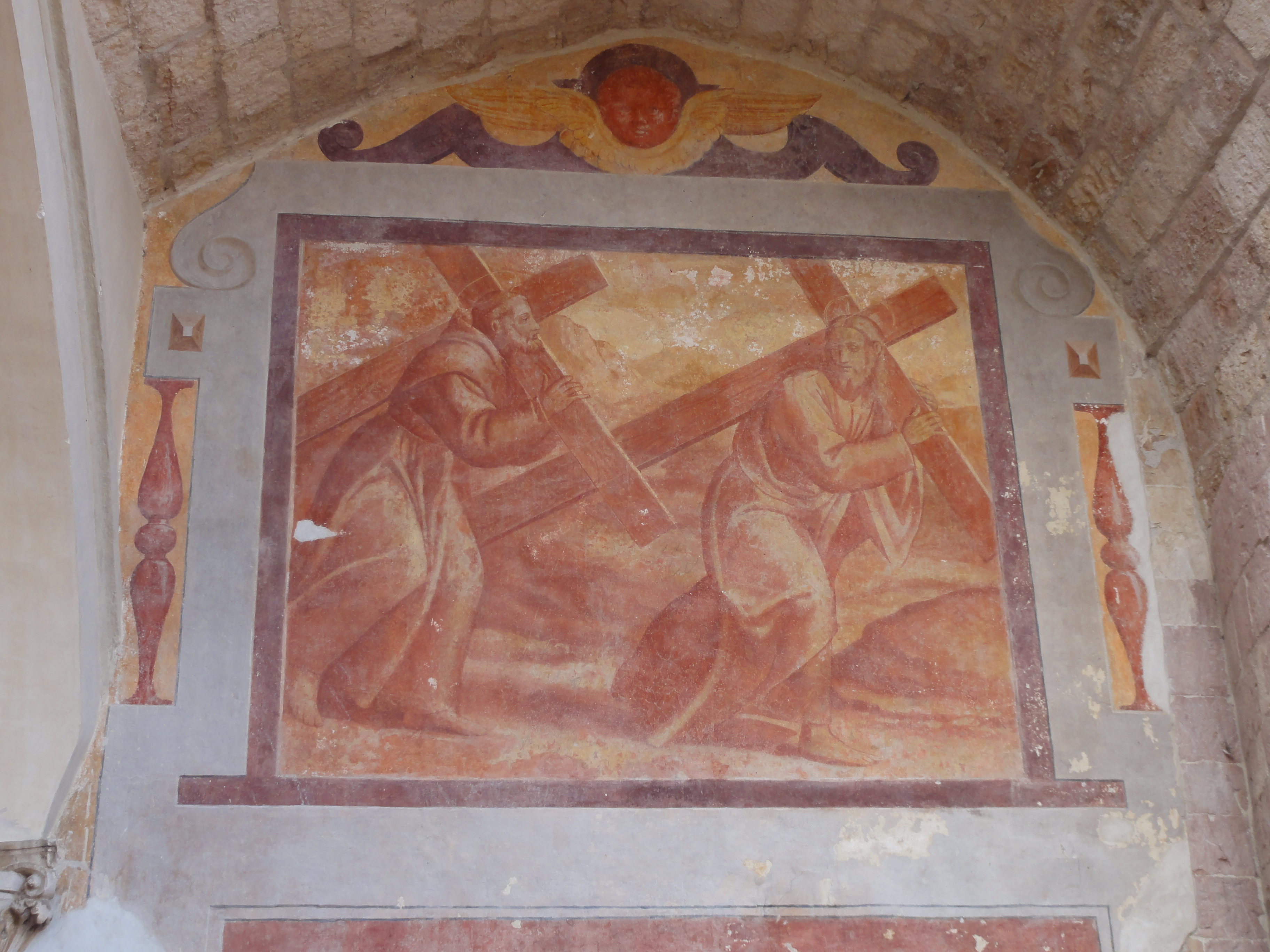 Assisi, Sacro Convento, Chiostro di Sisto IV (lato est, abside della Basilica), affresco di Dono Doni e figlio Lorenzo sopra la porta (nord) di accesso alla Basilica inferiore